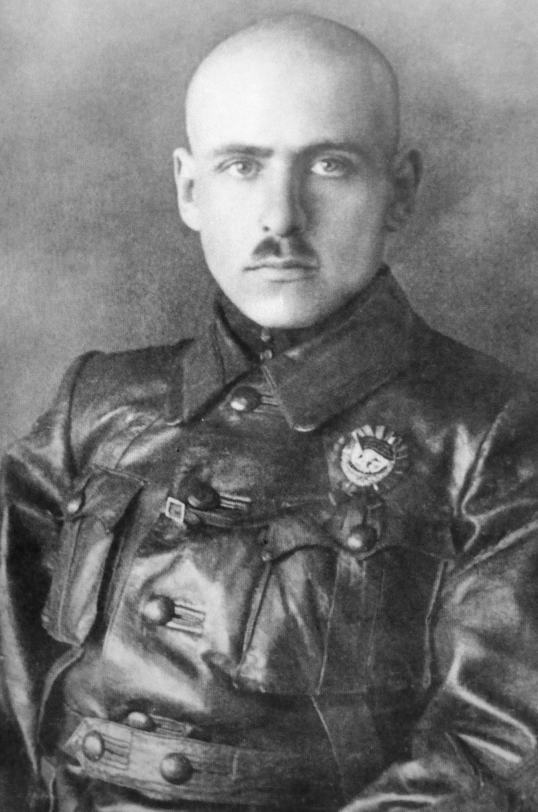 Василий Константинович Блюхер